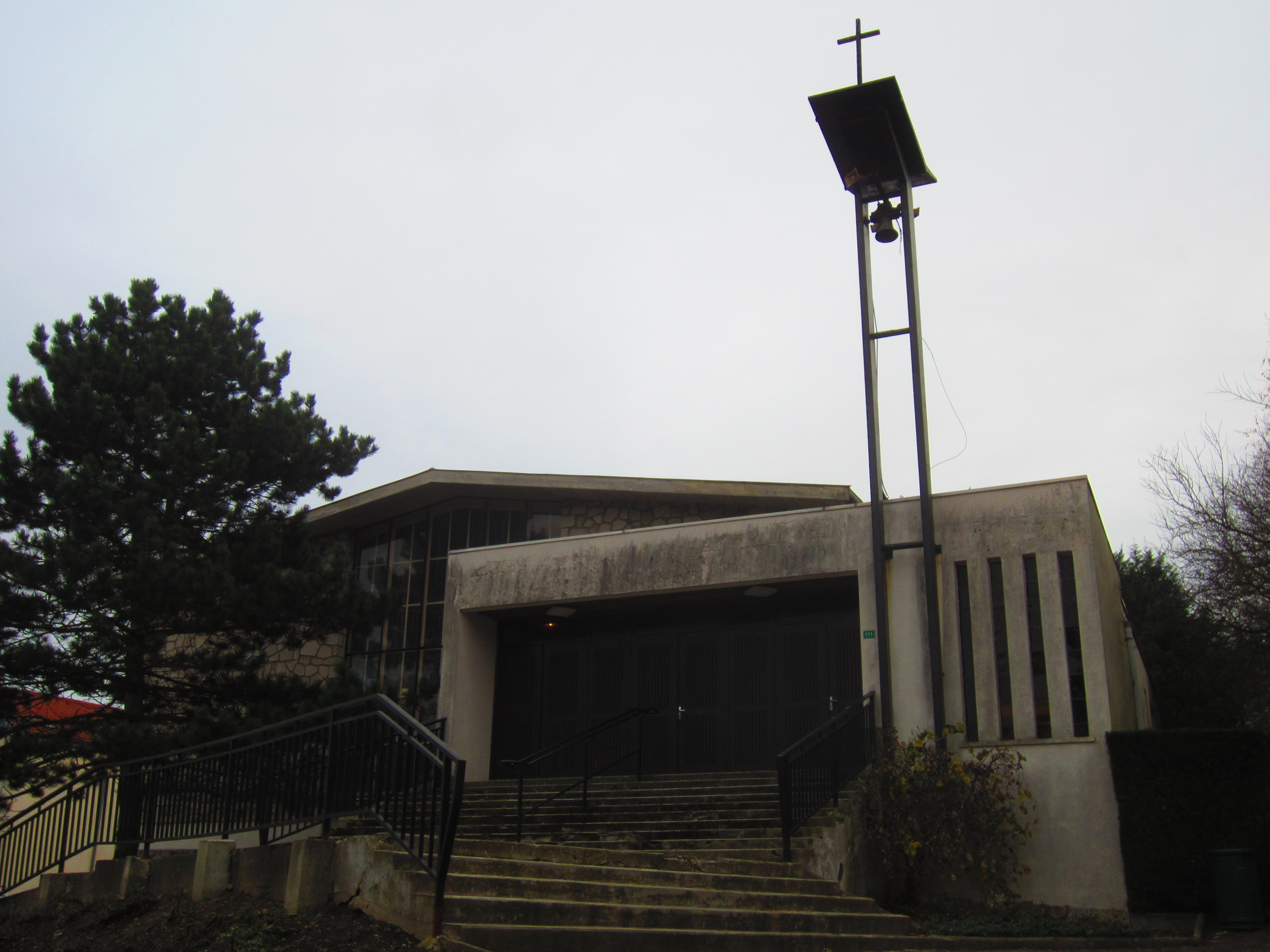 Eglise moderne Frouard